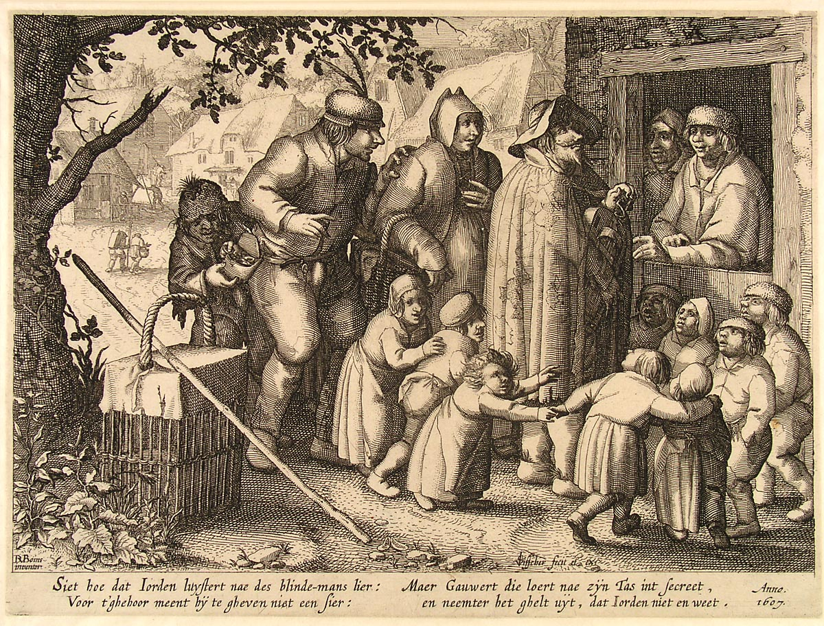 De blinde Liereman voor een huis. Alternate title